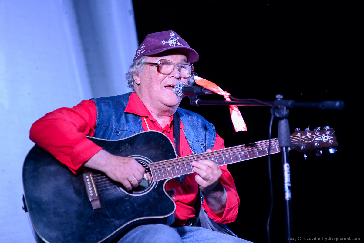 Борис Щеглов, Грушинский фестиваль 2015